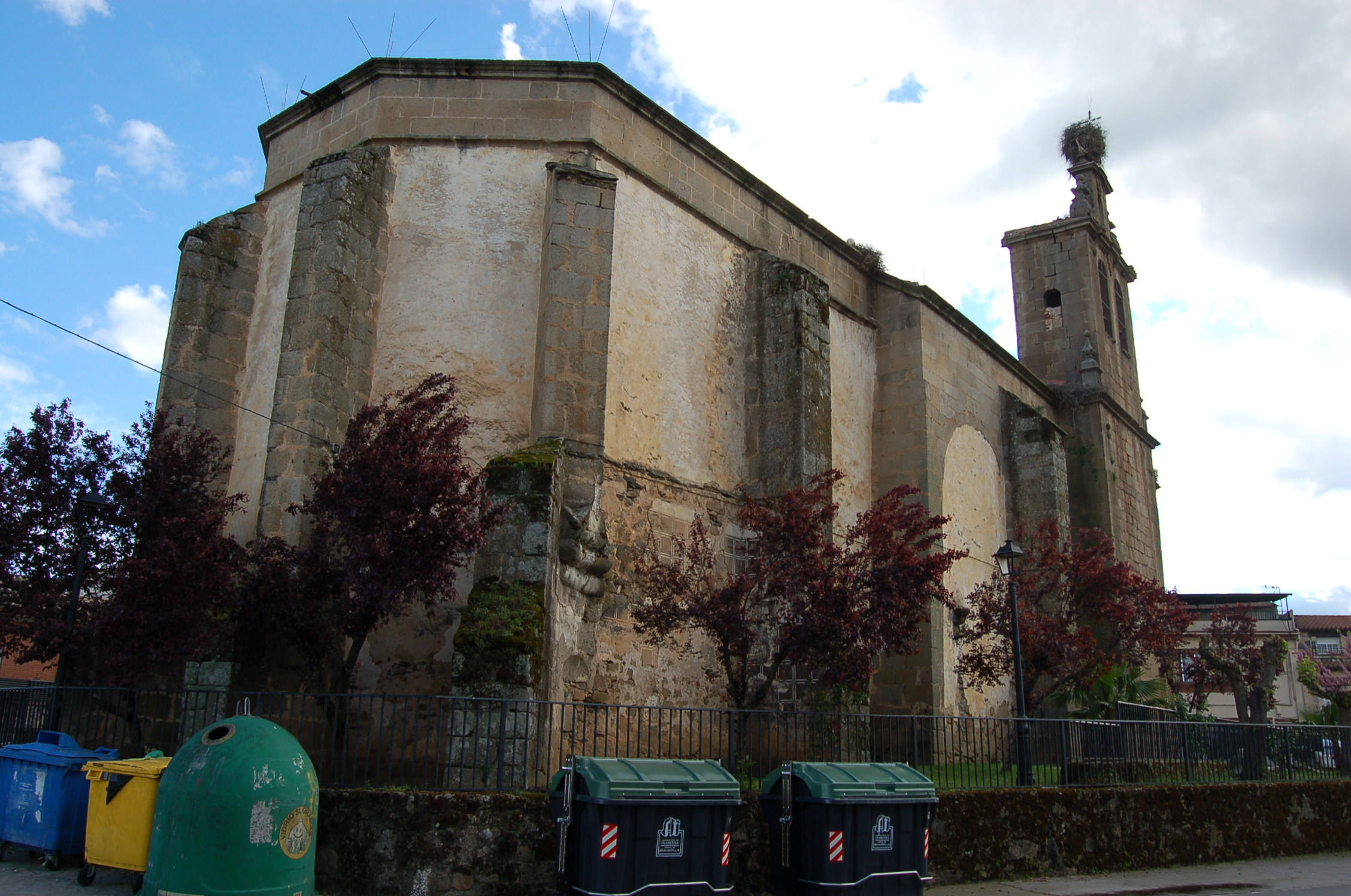 Iglesia de Santibáñez el Bajo